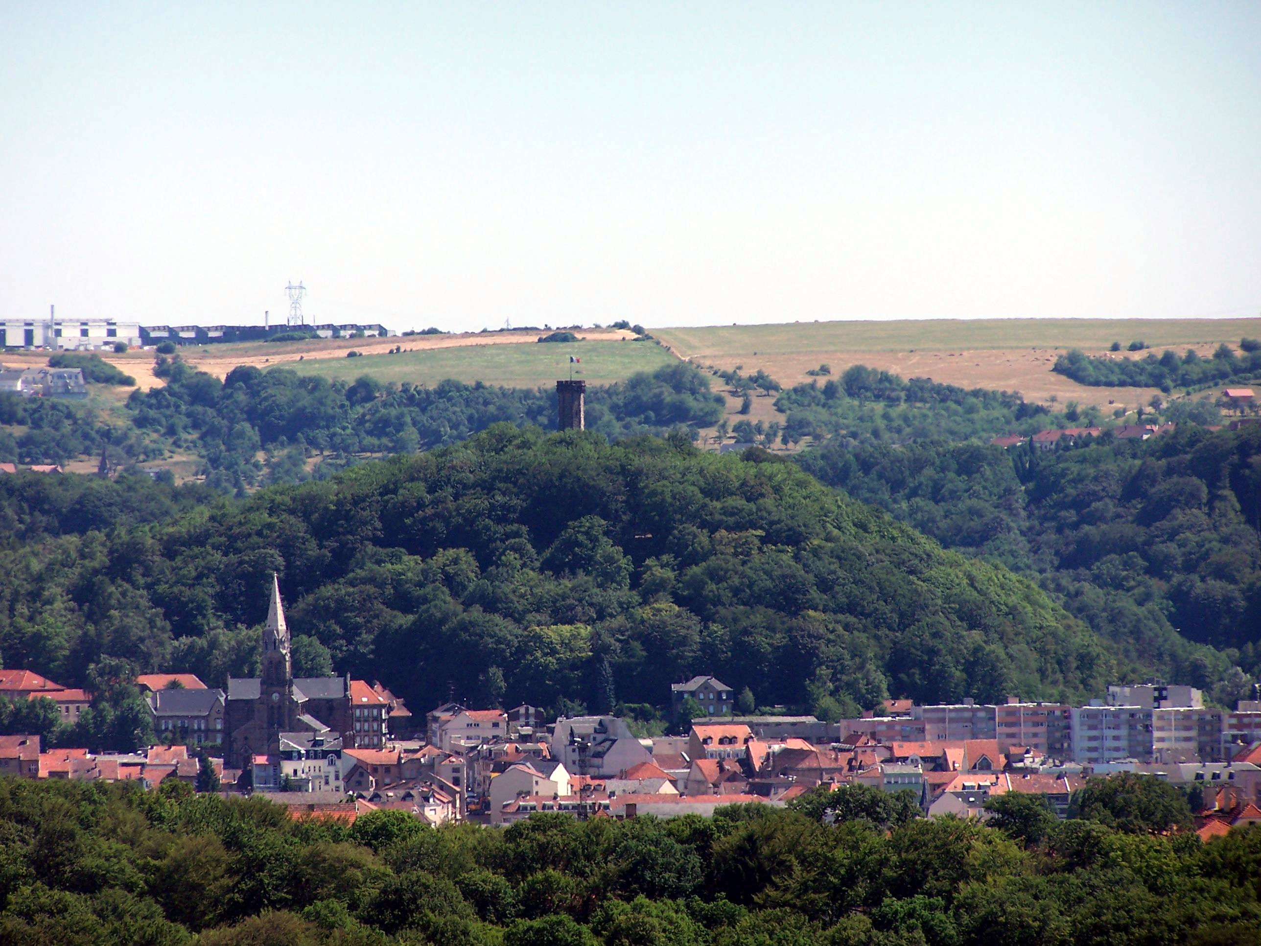 La butte du Schlossberg et le centre-ville de Forbach en avant plan, photo prise depuis la carrière HBL du parc à bois.